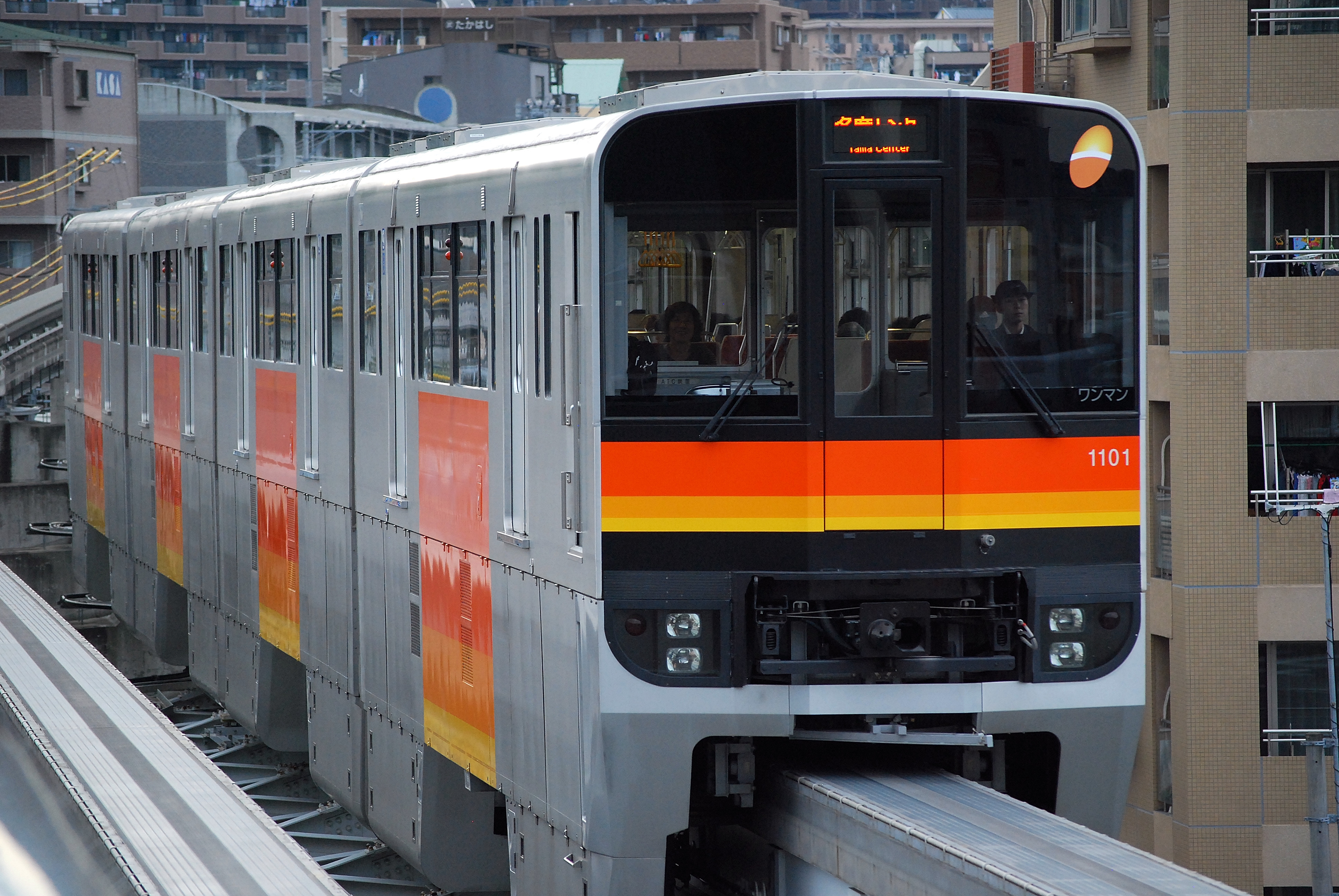 多摩都市モノレール1000系